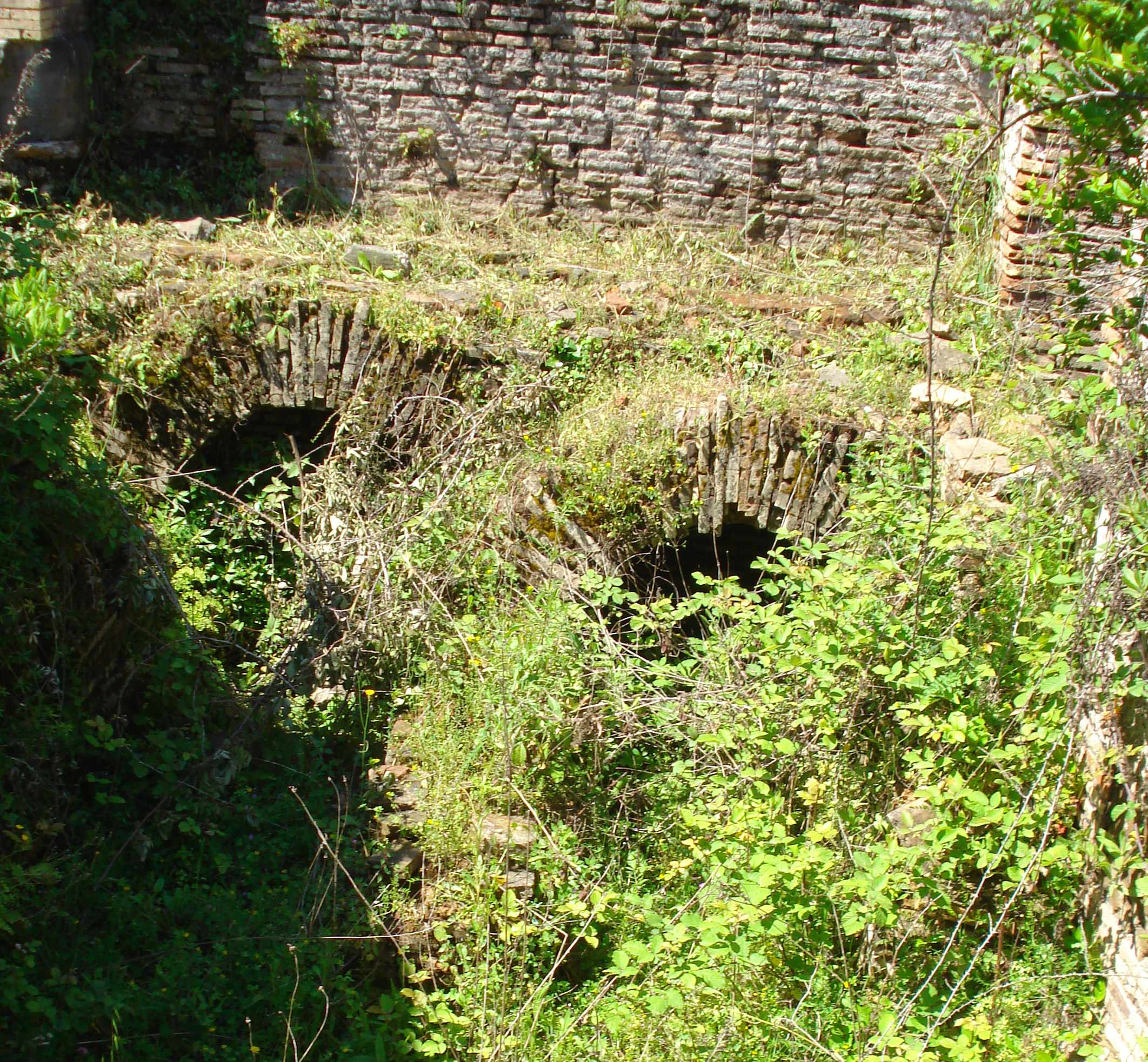 Teatro romano di Anzio - La fornace di VI sec d.C.